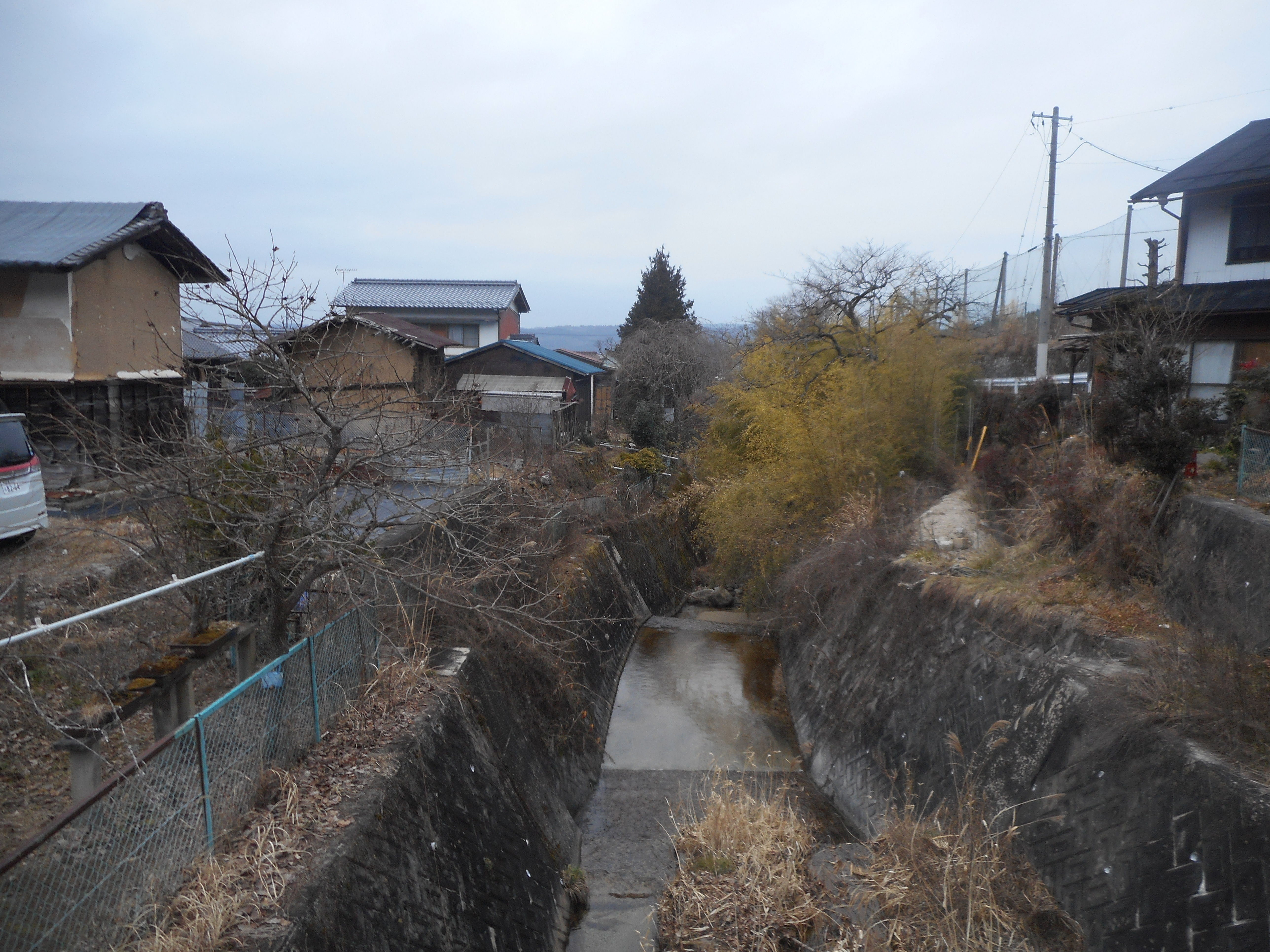 恵那市岩村町上町橋より撮影